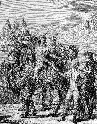 1) Mr Durand remettant des instructions à son envoyé à Galam ; il est accompagné de quelques employés 2) Mr Rubaud qui les reçoit 3) Un marabou de la suite du voyage 4) Un nègre domestique 5) Plusieurs habitants du village de Gandiole, témoins du départ (illustration de Atlas pour servir au voyage du Sénégal, ou Mémoires historiques, philosophiques et politiques sur les découvertes, les établissements et le commerce des européens dans les mers de l'Océan Atlantique, depuis le Cap-Blanc jusqu'à la rivière de Serra-Lionne inclusivement...